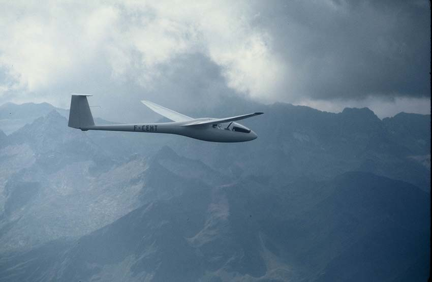 Planeur LS-1D de Nogaro au-dessus des Pyrénées